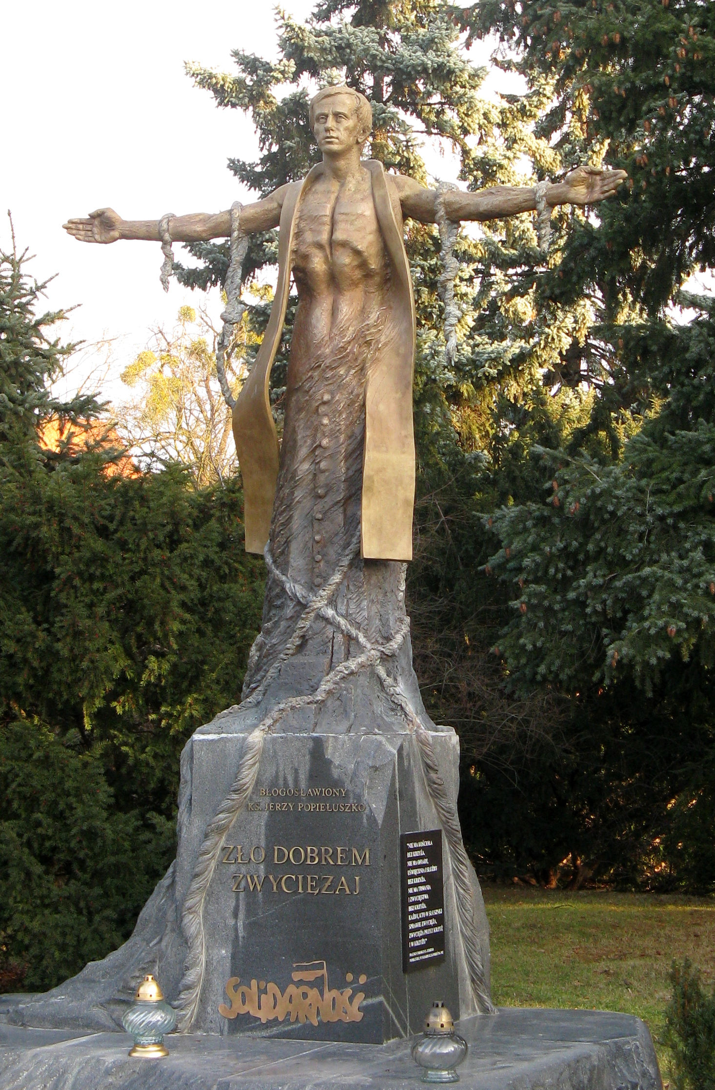 Pomnik Jerzego Popiełuszki w Toruniu, wykonany według projektu Gustawa Zemły przez Pawła Pietrusińskiego, odsłonięty 19 października 2011